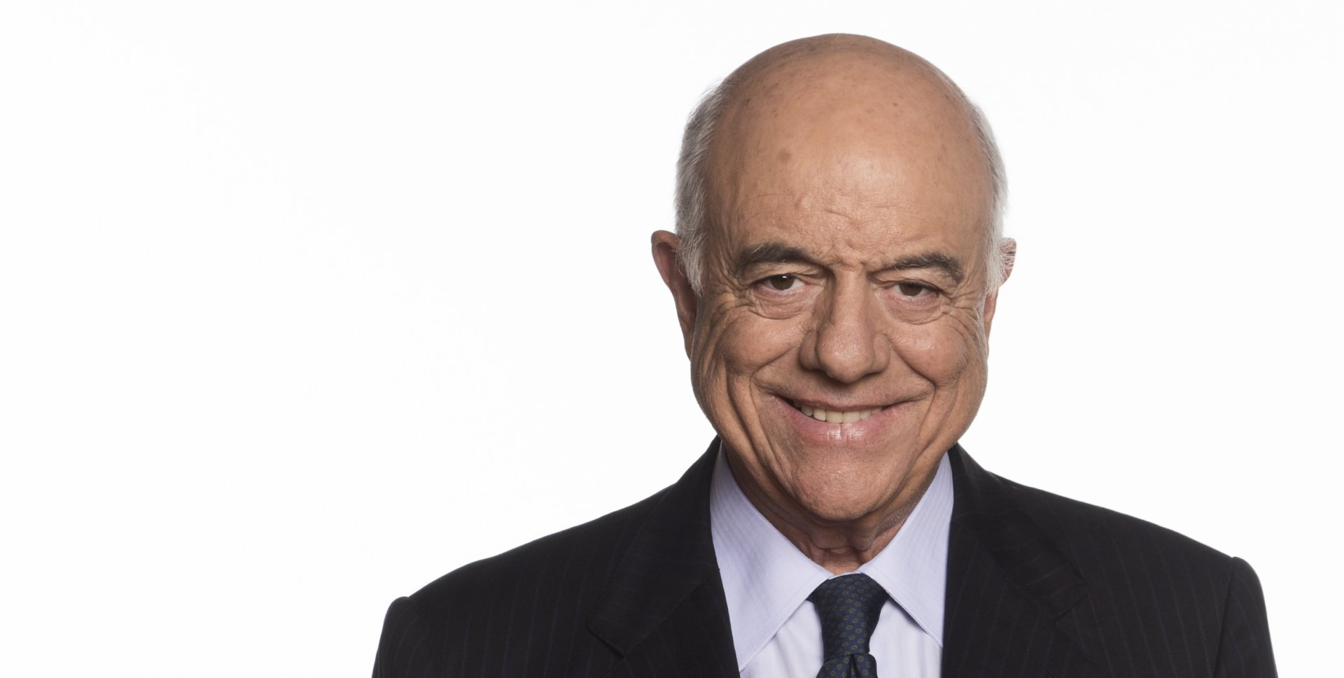 Foto del presidente del BBVA Francisco Gonzalez